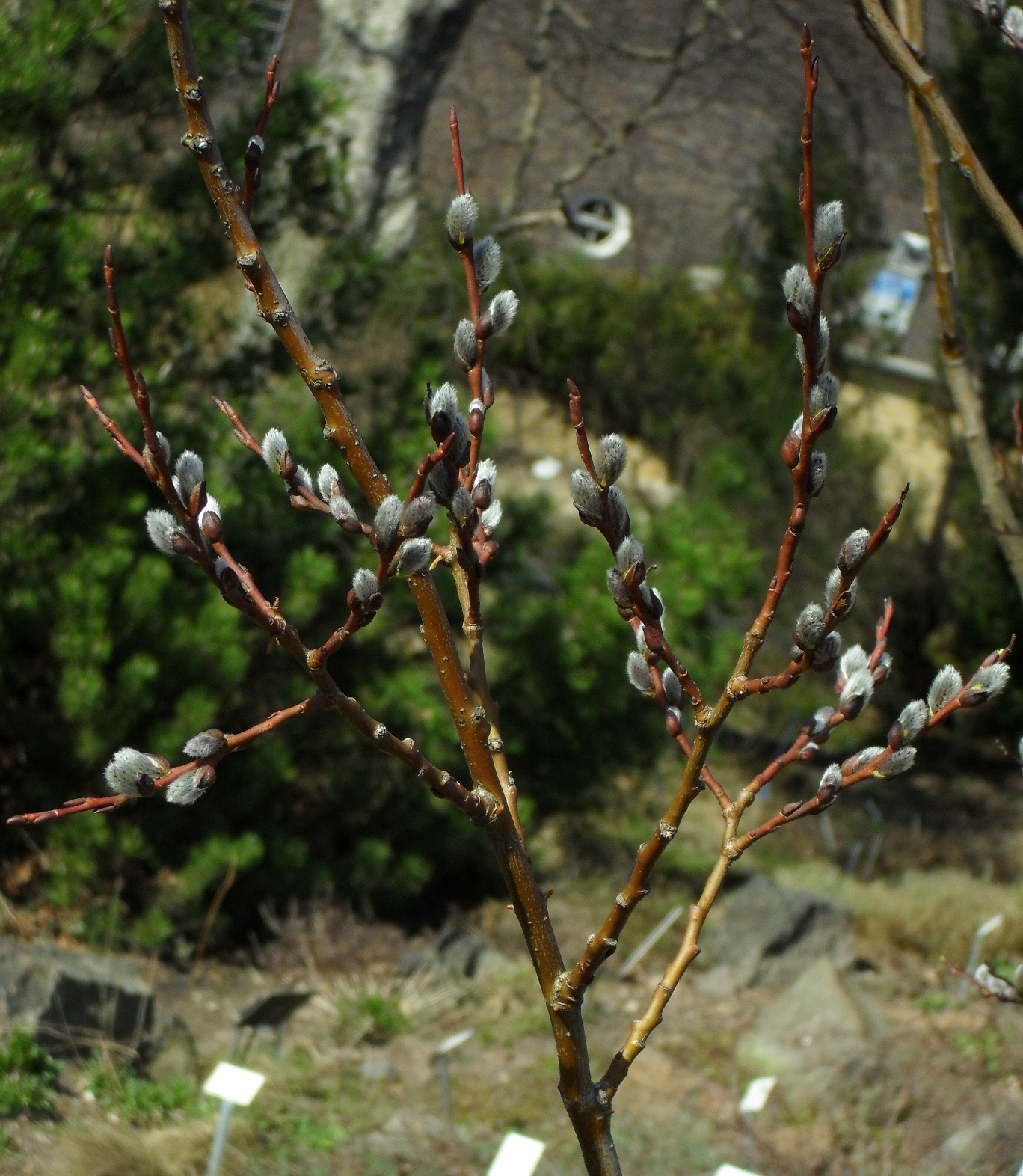 Salix bicolor (Zweifarben-Weide) - Botanischer Garten Leipzig